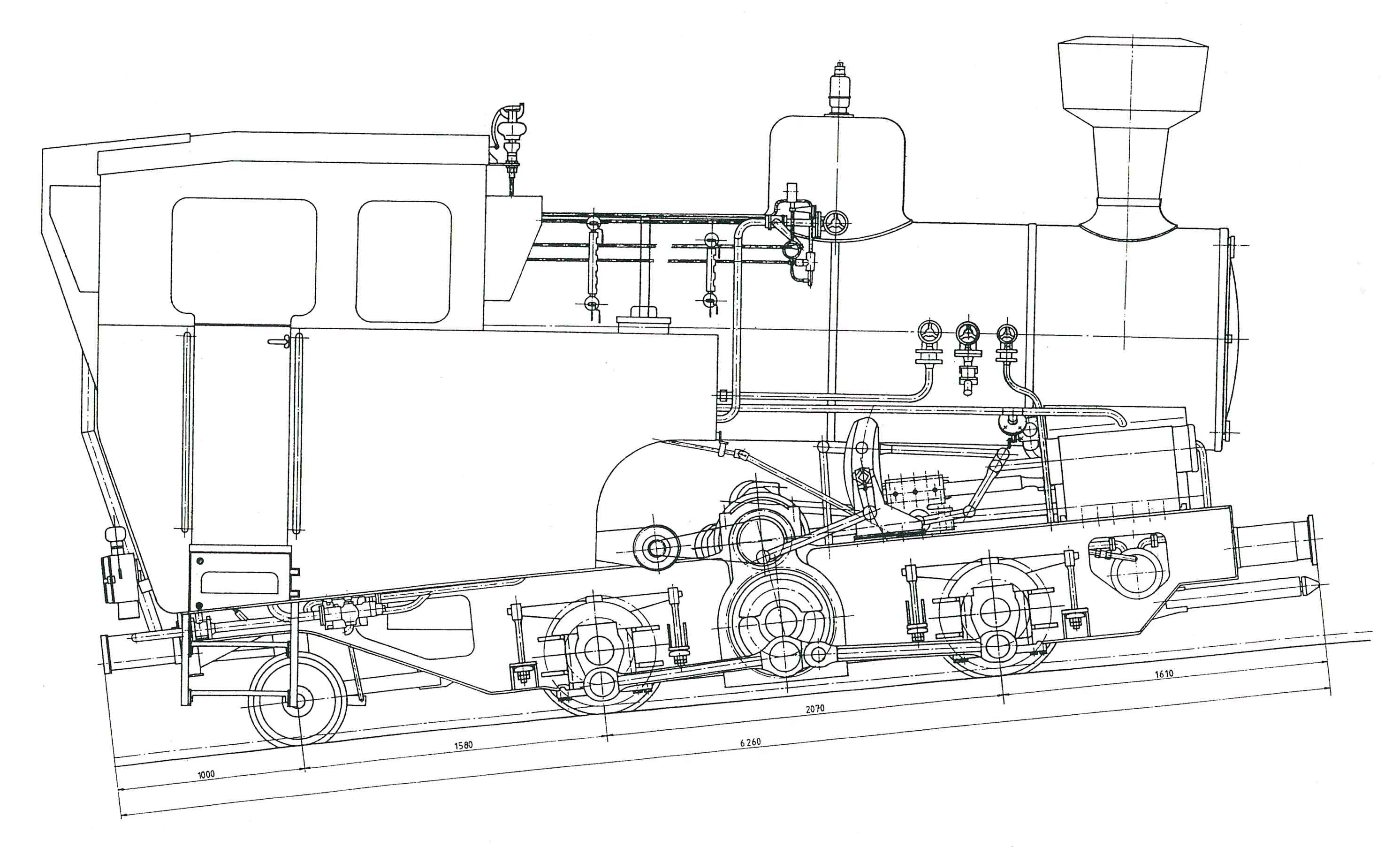 Zahnrad-Dampflokomotive H 2/3